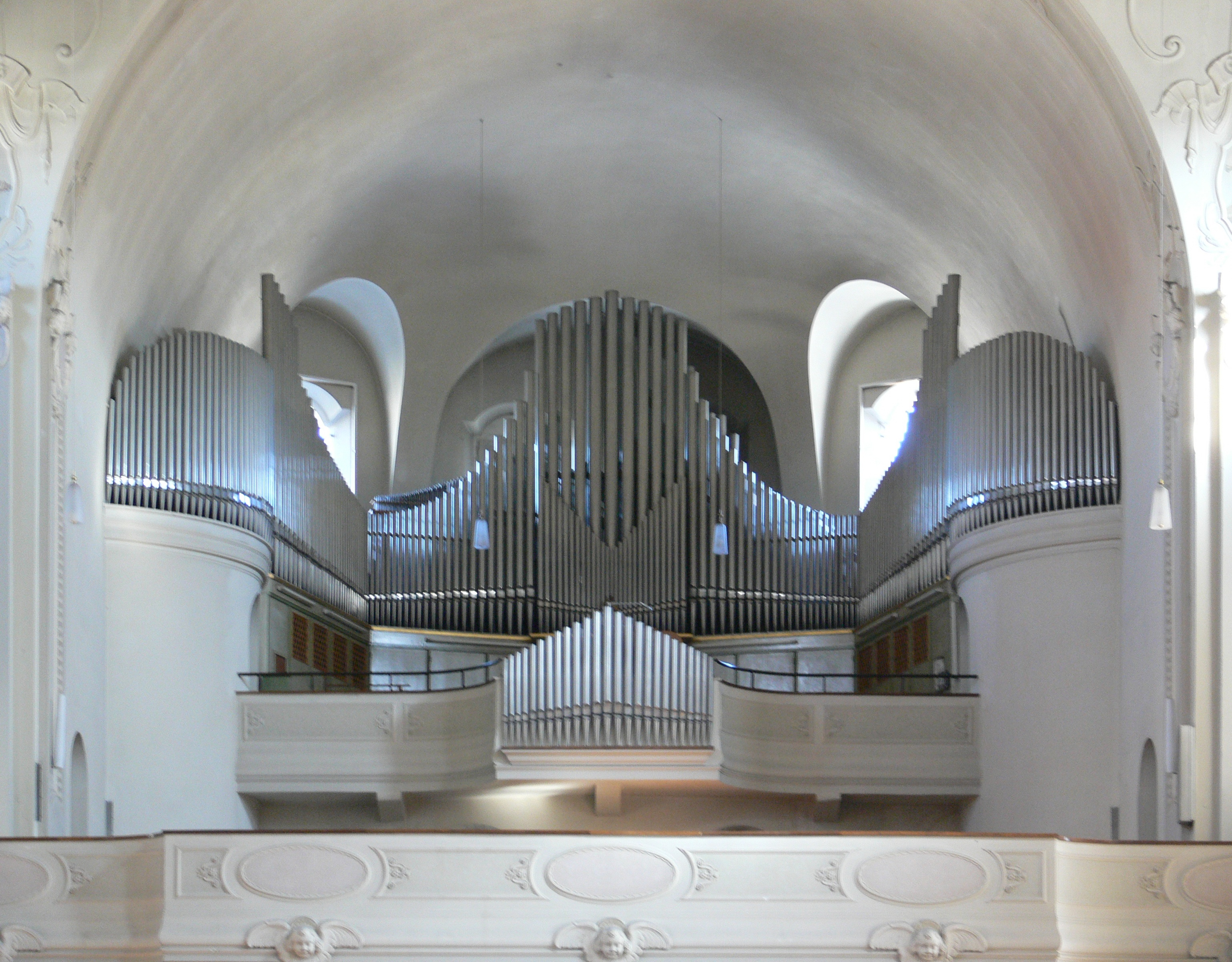 Lindenberg im Allgäu, Katholische Stadtpfarrkirche St. Petrus und Paulus Orgel von Josef Zeillhuber, Altstädten/Allgäu, Neubau 1934, III/P mit 54 Registern (1959 um eine 32' Tuba im Pedal erweitert)